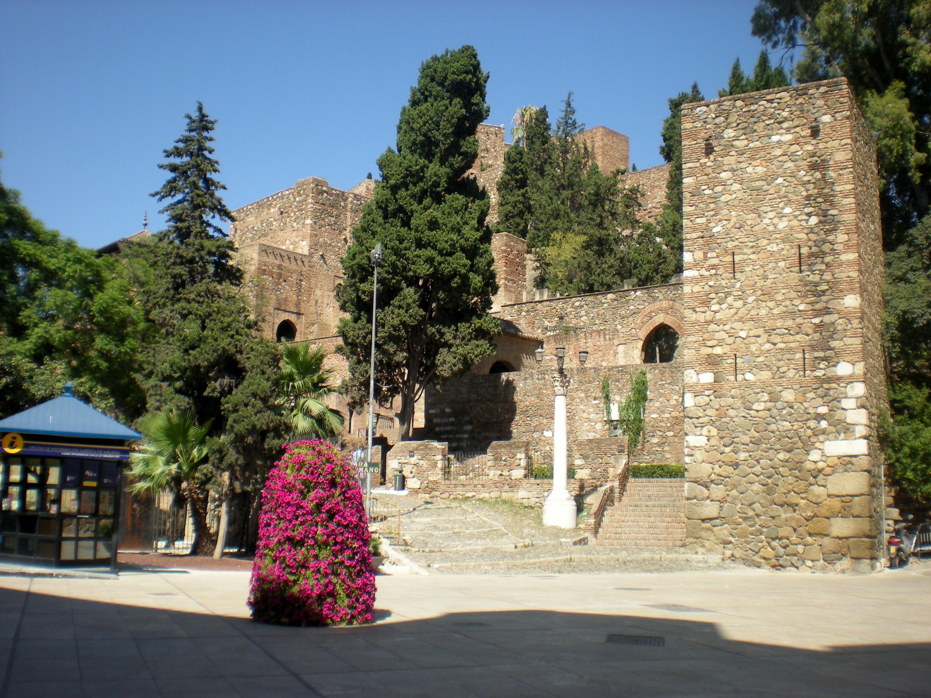 Una foto del castillo de Málaga